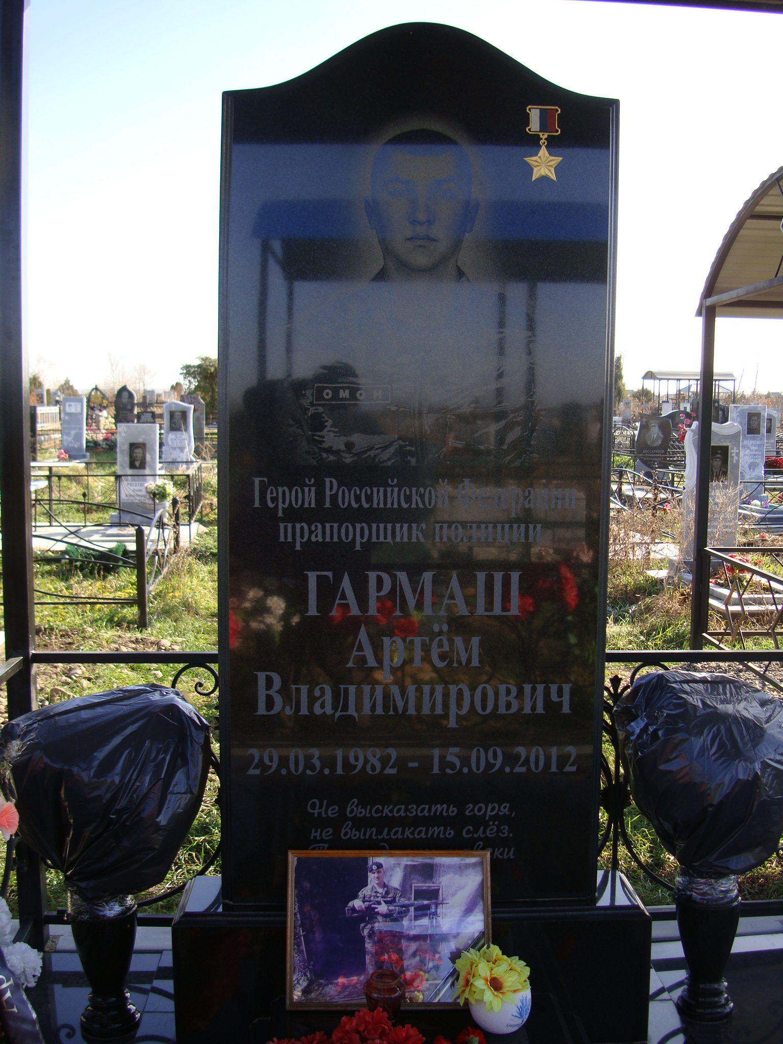 Надгробный памятник Герою России Гармашу А.В.